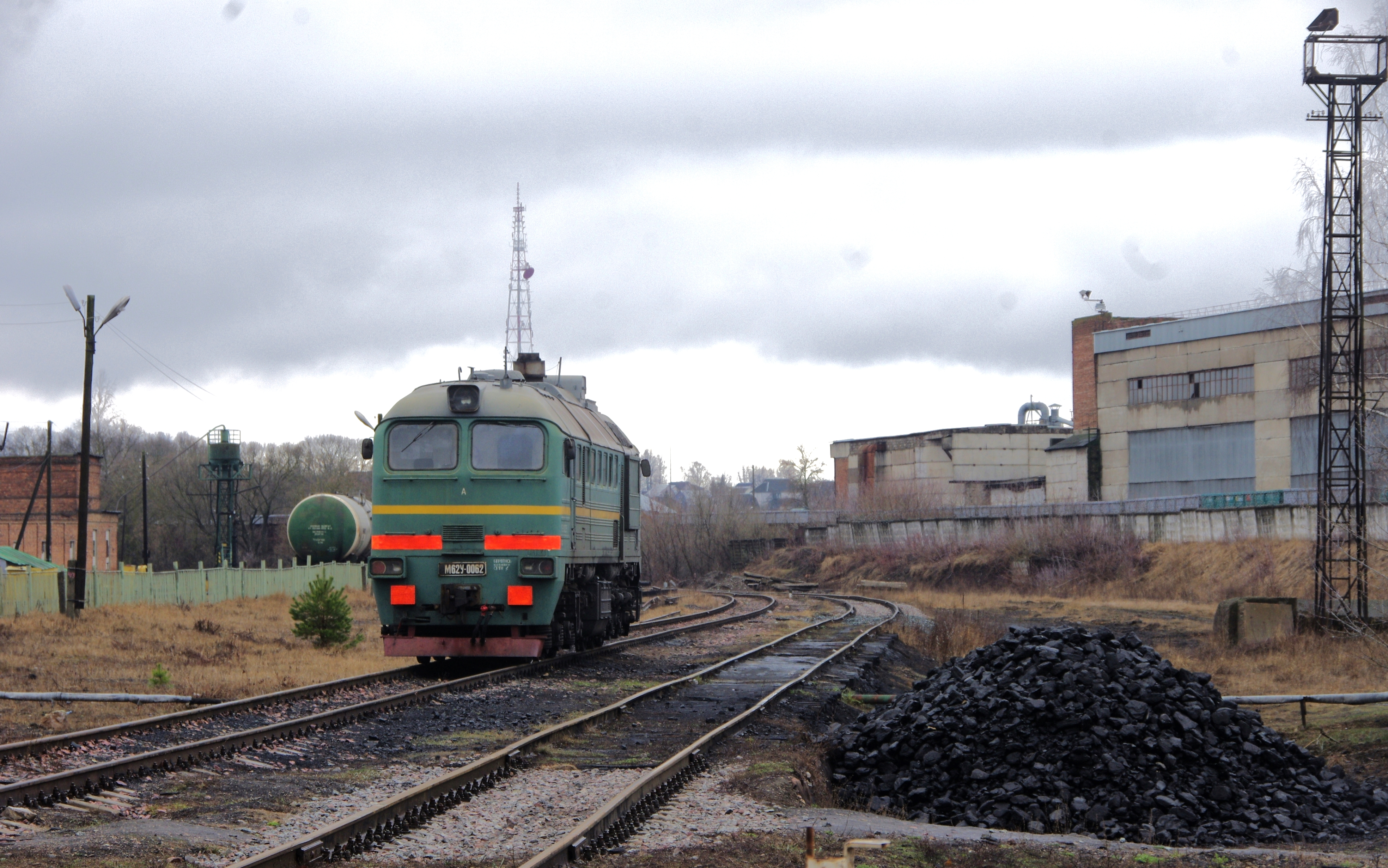 RZD M62U-0062 near Roslavl depot. It located far away from mainline railway. М62У-0062 у депо Рославль. Депо находится где-то в промзоне, сбоку от основной железной дороги. В 2000-х годах в депо обслуживались паровозы Московской железной дороги, в 2010-х все паровозы переехали в депо Подмосковная, сейчас в депо Рославль только путейские машины.